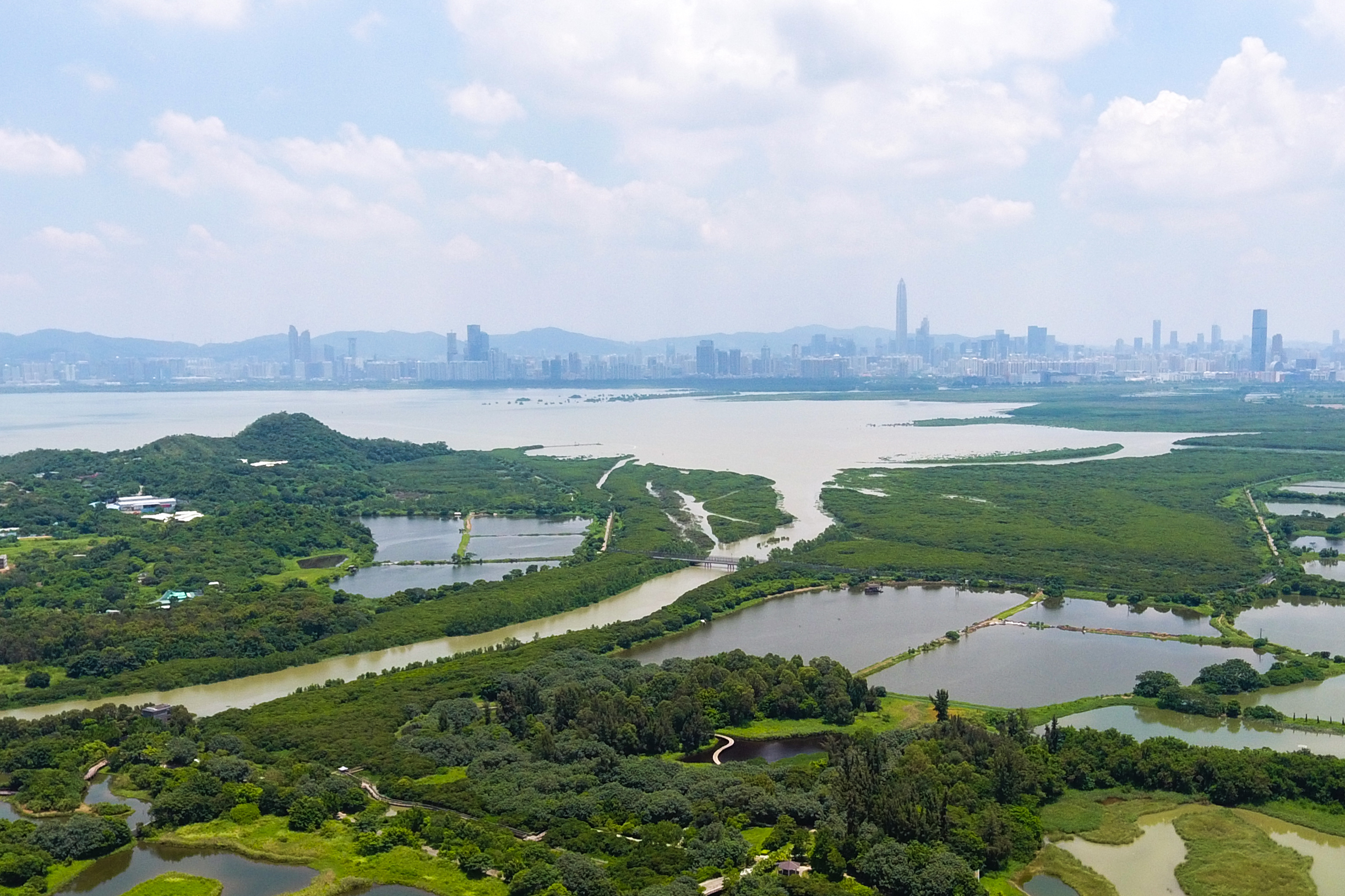 Tsim Bei Tsui